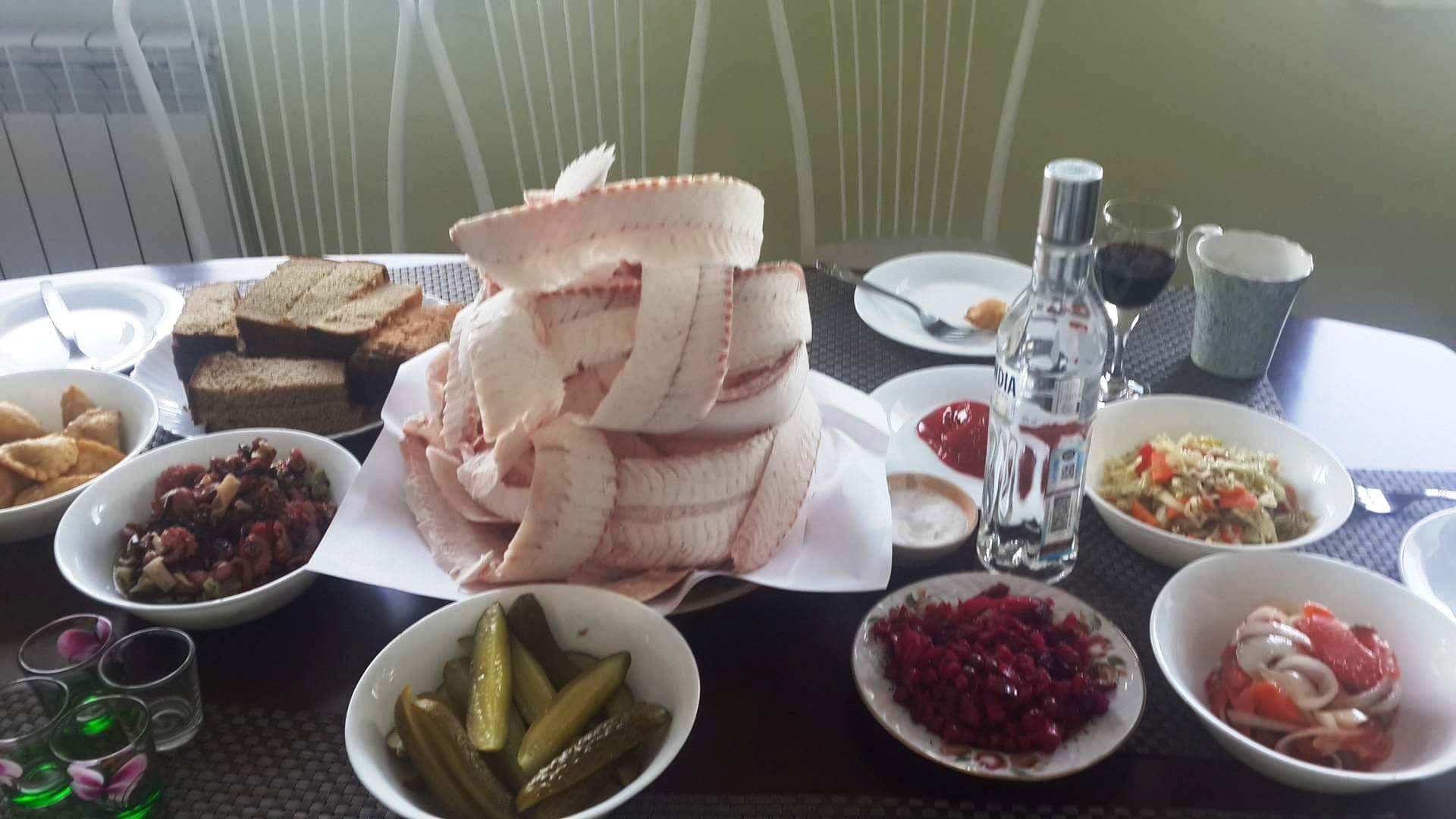 Stroganina